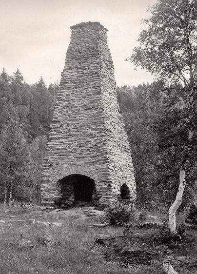 Kvikne kobberverk i Nåverdalen. Foto: G. Thuesen. Fra Riksantikvarens Kulturminnesøk.